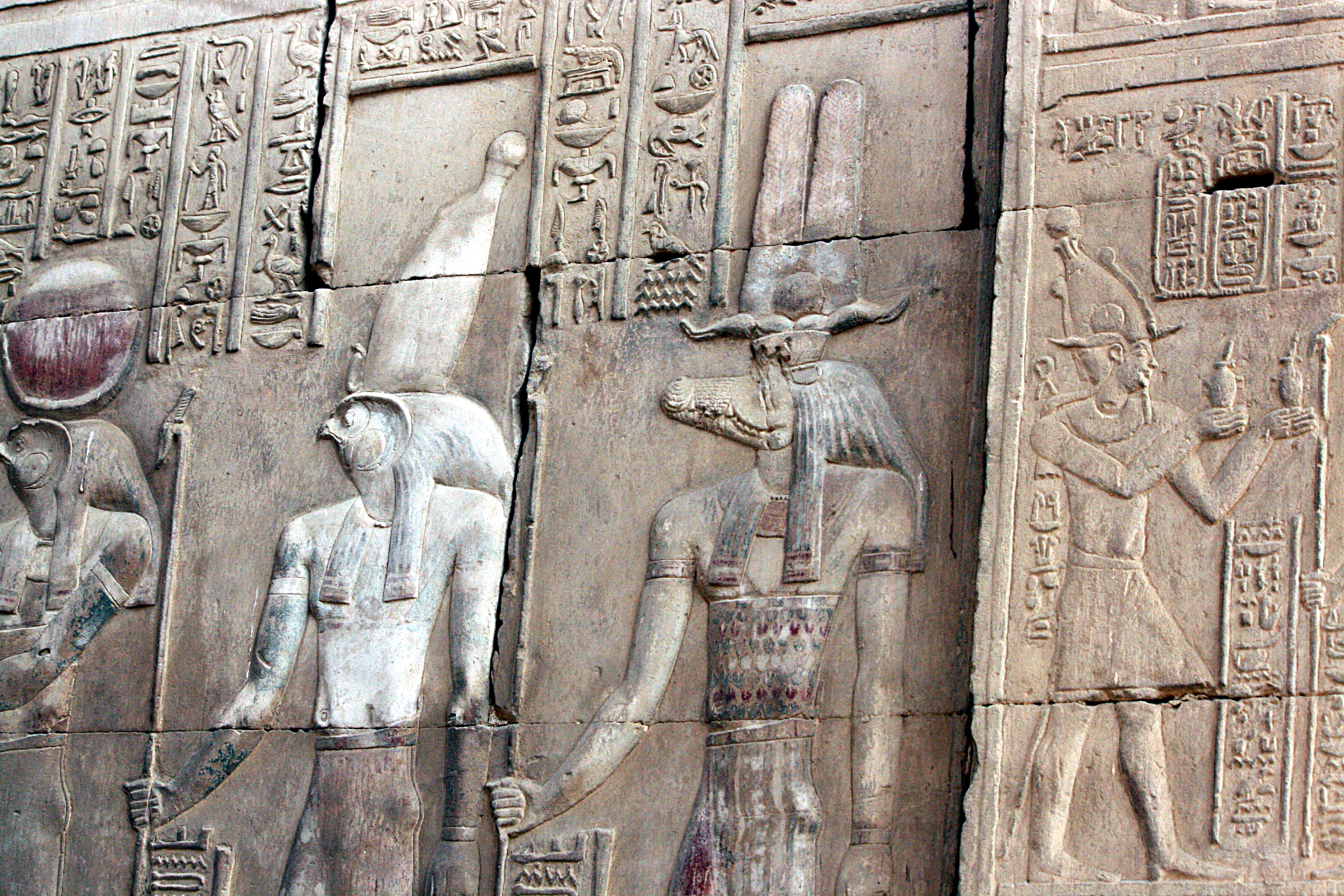 Tempel von Kom Ombo: Relief des Krokodilgottes Sobek